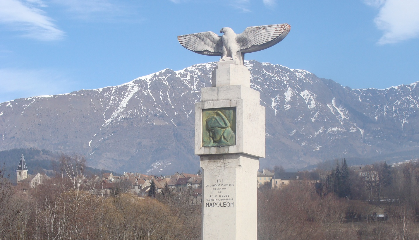 Le monument commémorant la halte de Napoléon au pied de Saint-Bonnet-en-Champsaur lors de son retour de l'île d'Elbe